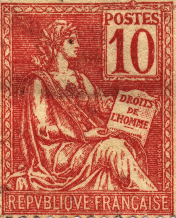 Timbre français Mouchon, type 2.